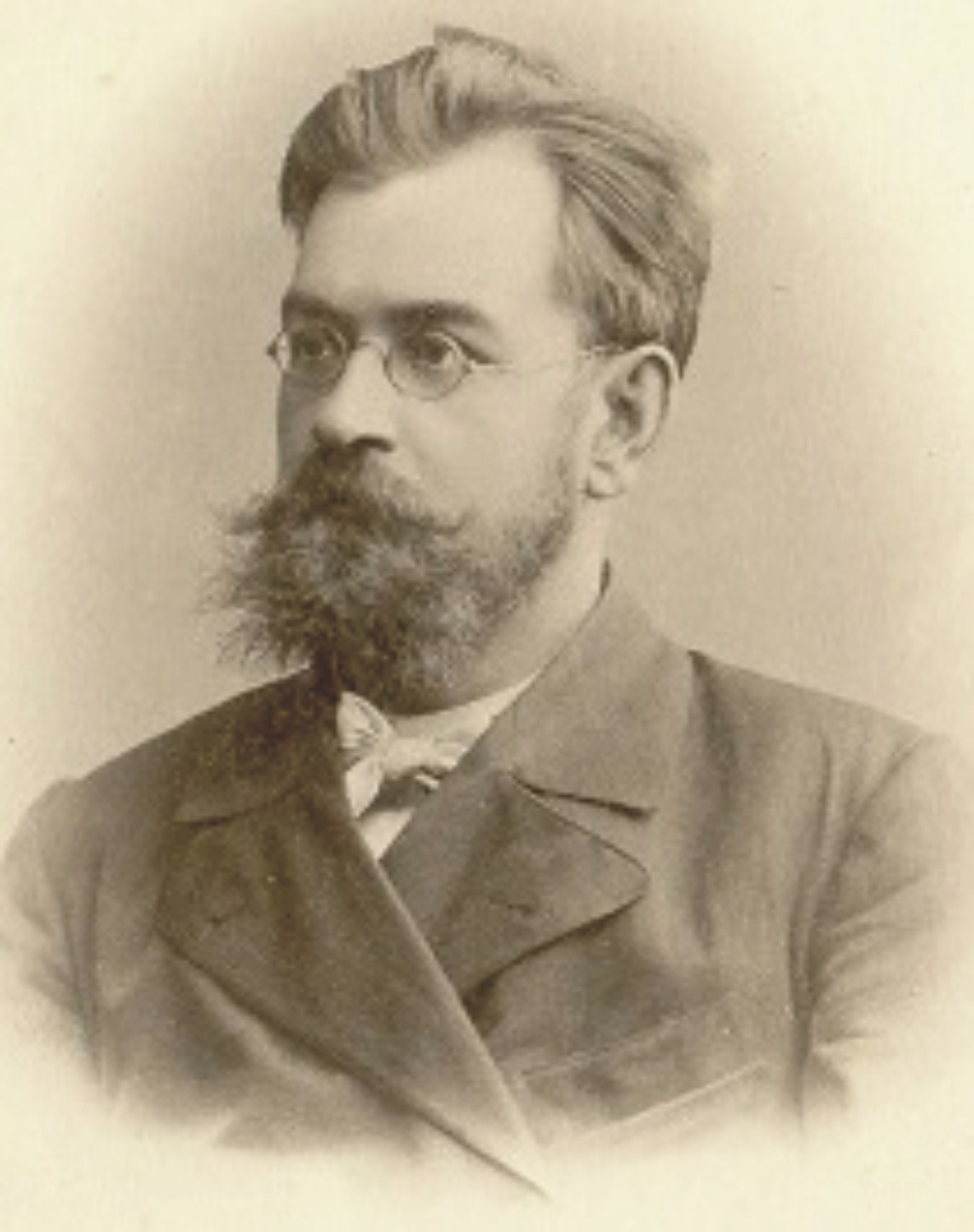 Василий Иванович Разумовский (1857-1935) — российский и советский хирург, доктор медицины, ректор Императорского Николаевского университета (1909 — 1912).